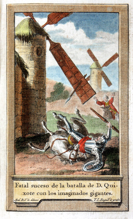 Es un grabado que pertenece a El ingenioso hidalgo Don Quixote de la Mancha (Imprenta Real), Madrid, 1797, 1798. Episodio: Aventura de los molinos de viento. Título: Rocinante y Don Quijote son arrastrados por el aspa del molino. Ubicación: I, cap. 8